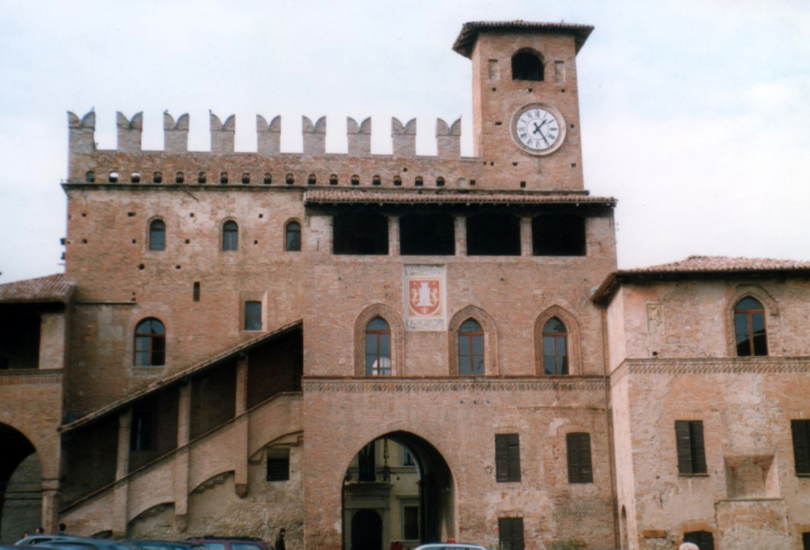 Autore Giorces. PD. Castell'Arquato.